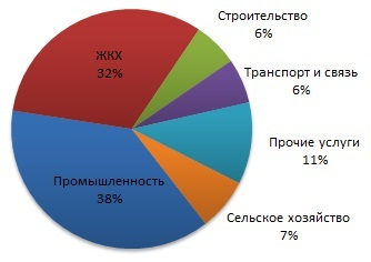 Отраслевая структура крупных и средних предприятий МО "Котлас", % к общему объему выпуска товаров и услуг собственного производства (2009 г.). Источник данных: (страница 31)